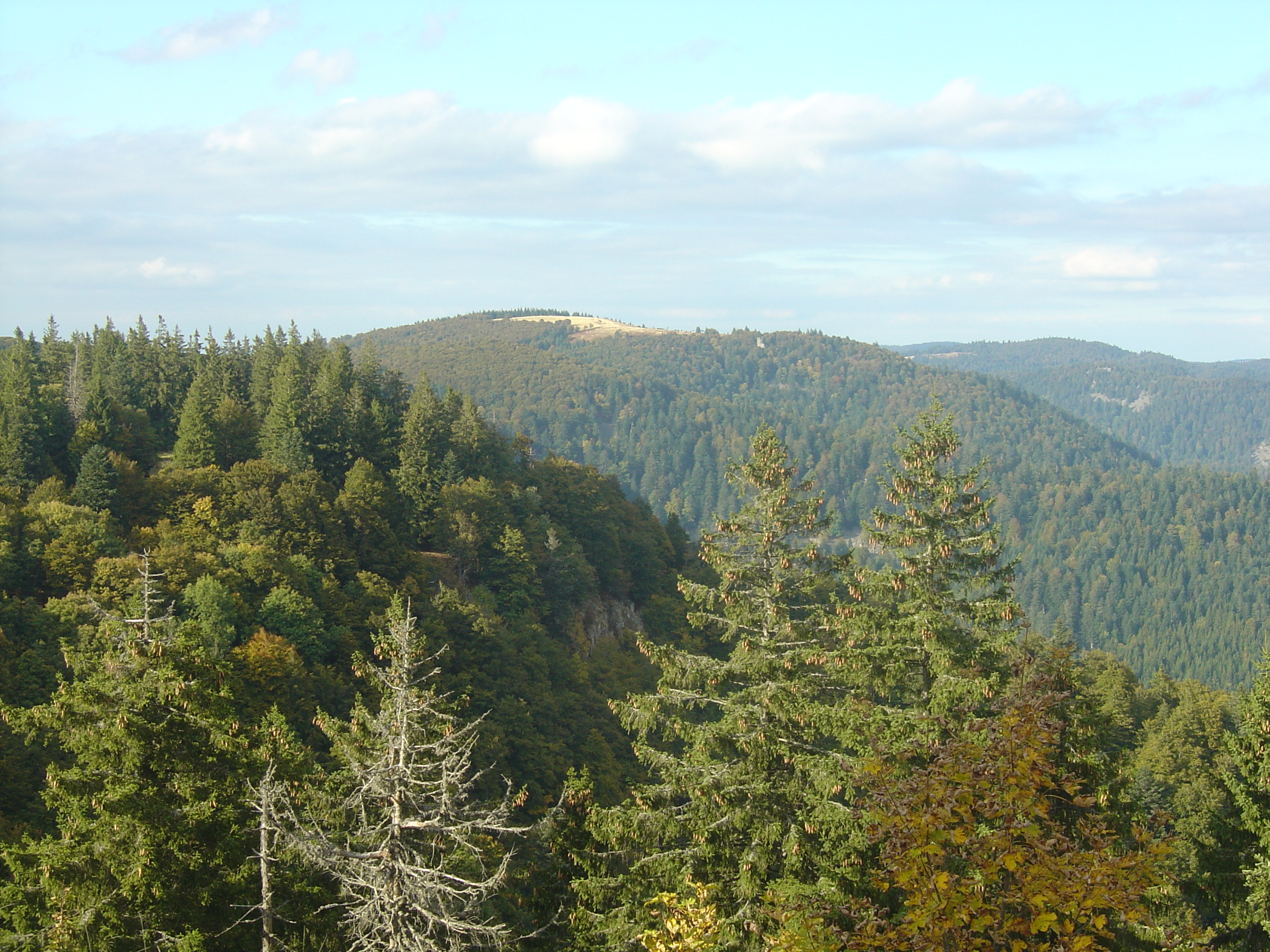 Vue sur la réserve naturelle du massif du Ventron depuis le Haut de Felsach (1161m). On voit plus loin le Grand Ventron (1204m).